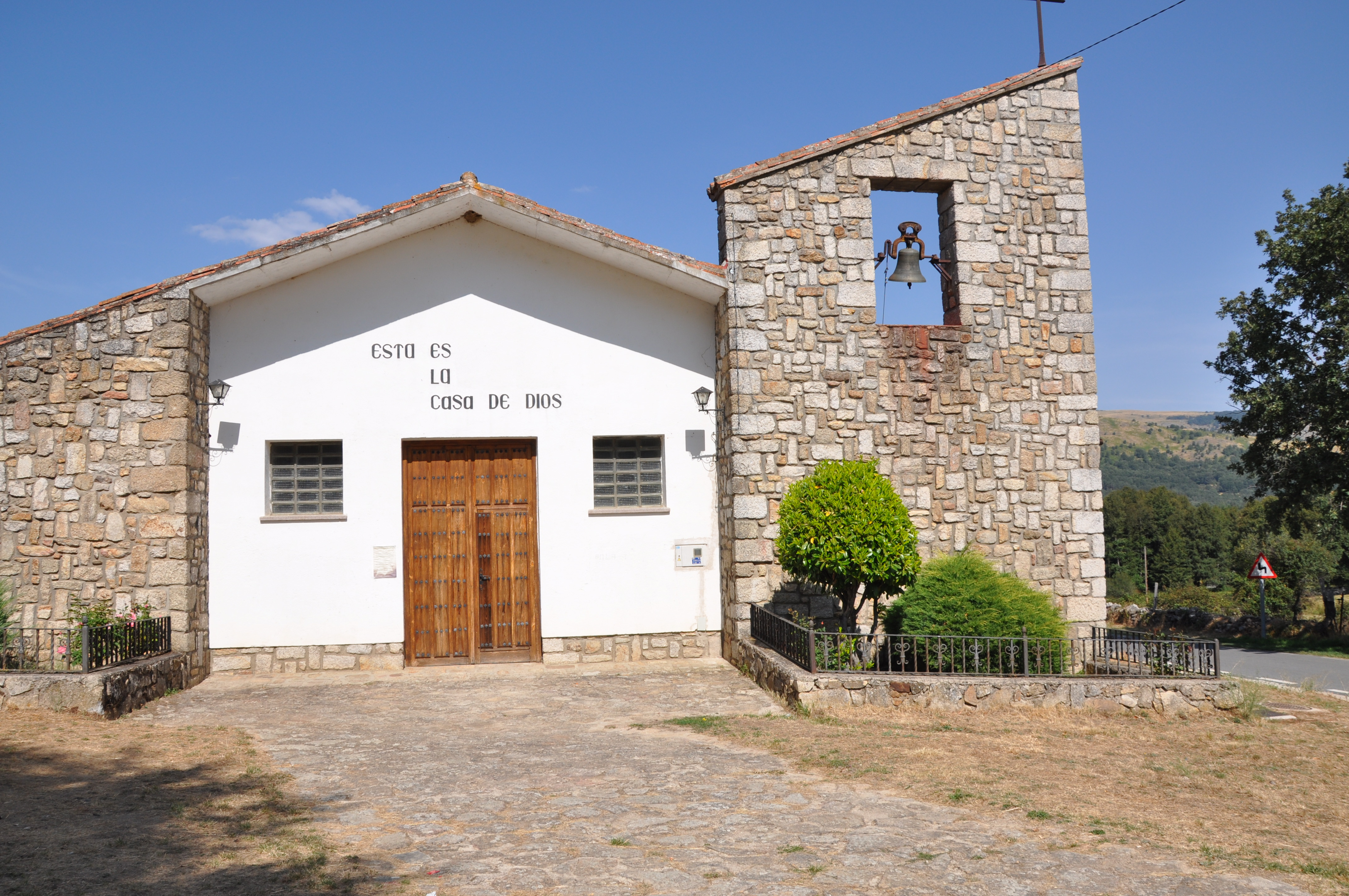 Iglesia parroquial de Umbrías, Ávila, España